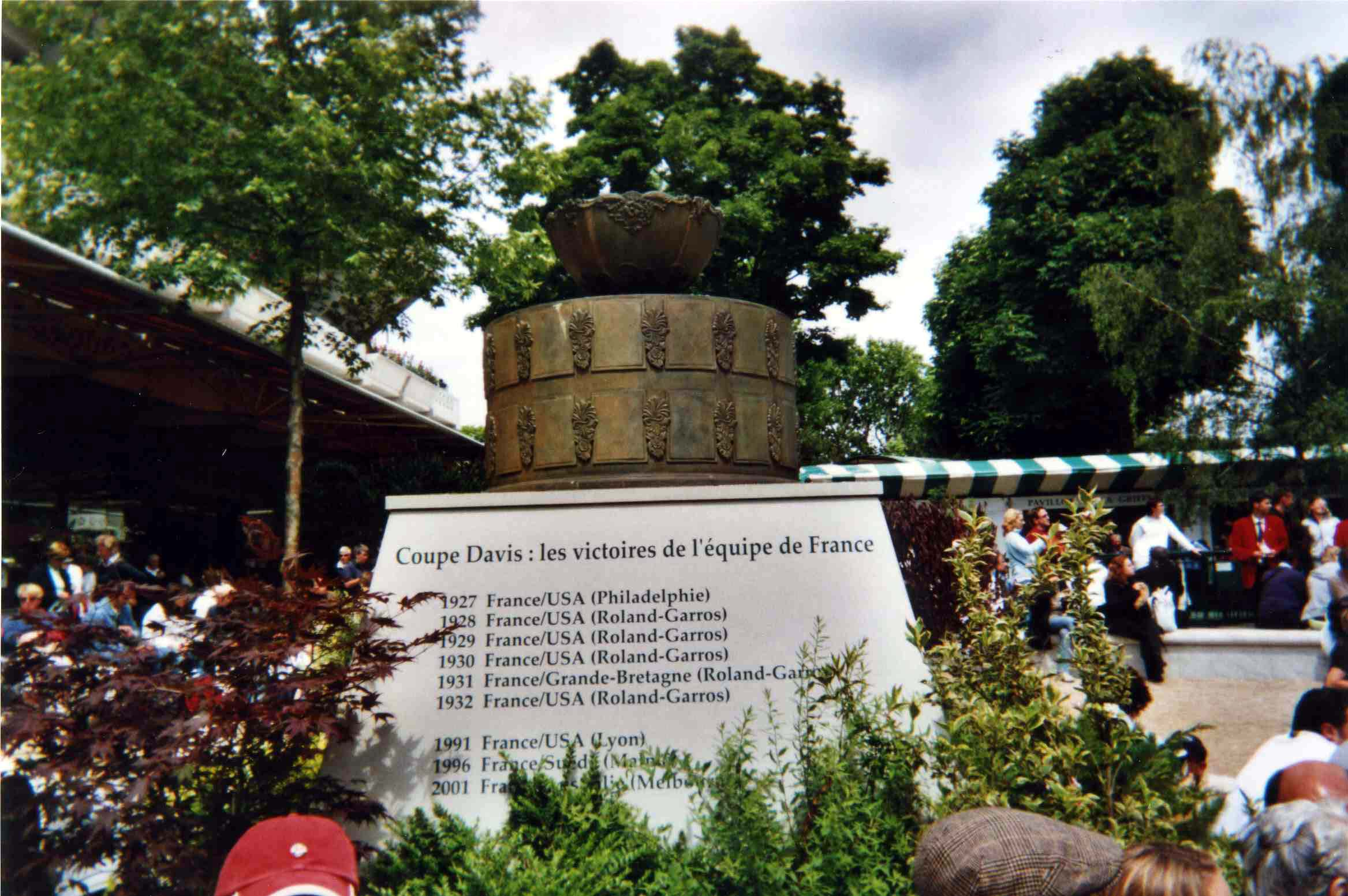 Monument Coupe Davis au Stade Roland Garros (Paris, France)